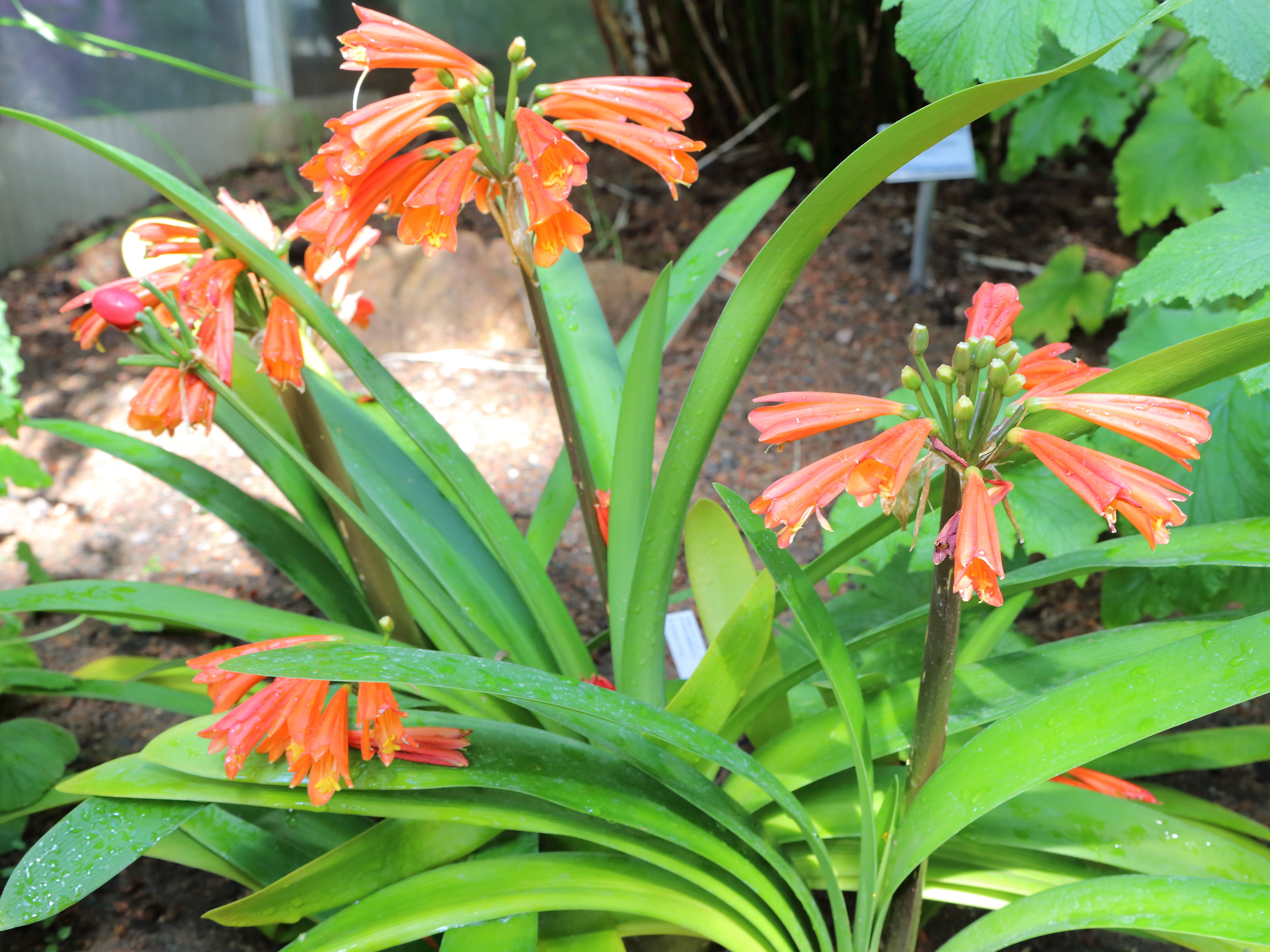 Clivia robusta identifierad med hjälp av skylt i Göteborgs botaniska trädgård.